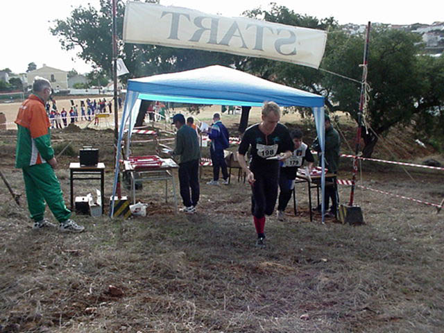 Description